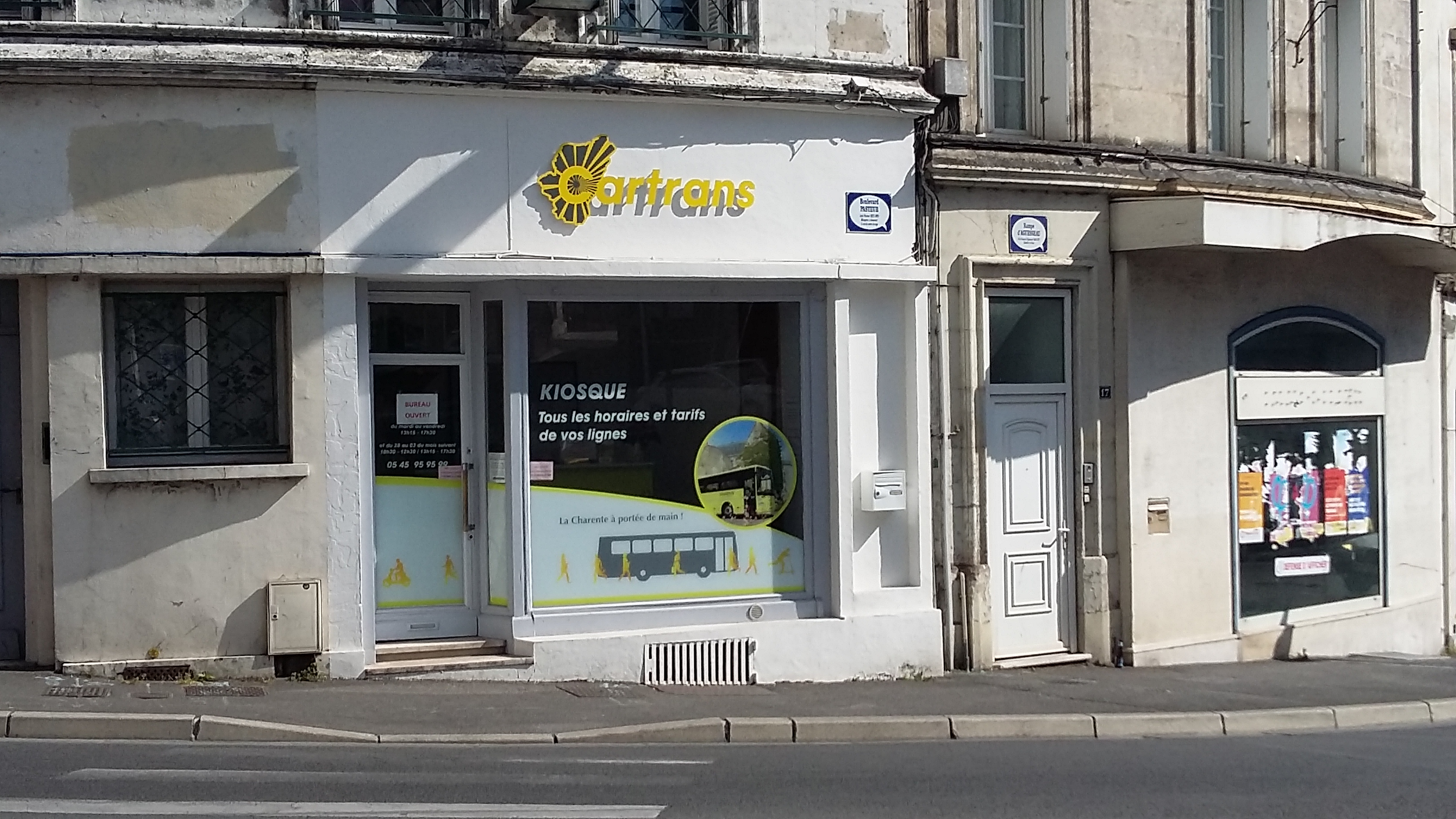 Kiosque de vente et de services Cartrans à Angoulême.